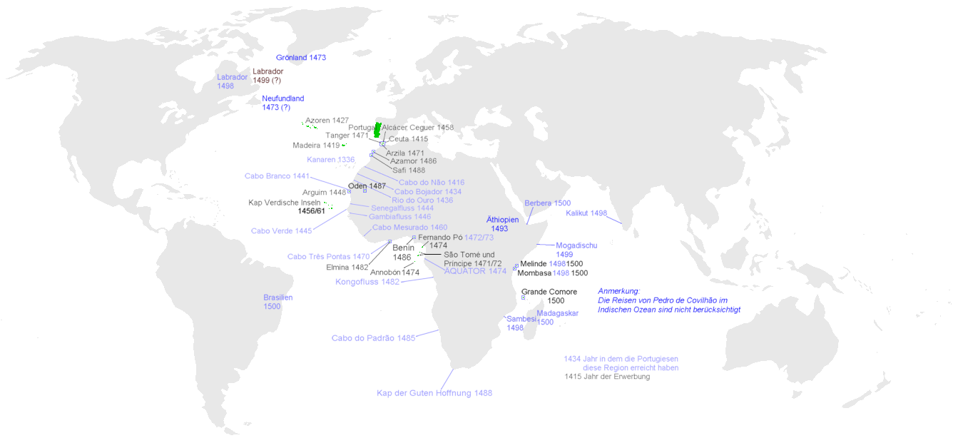 Das portugiesische Kolonialreich im Jahr 1500 und die vorangegangenen Entdeckungen (The Portuguese Empire in 1500 AD and the before discovered areas).